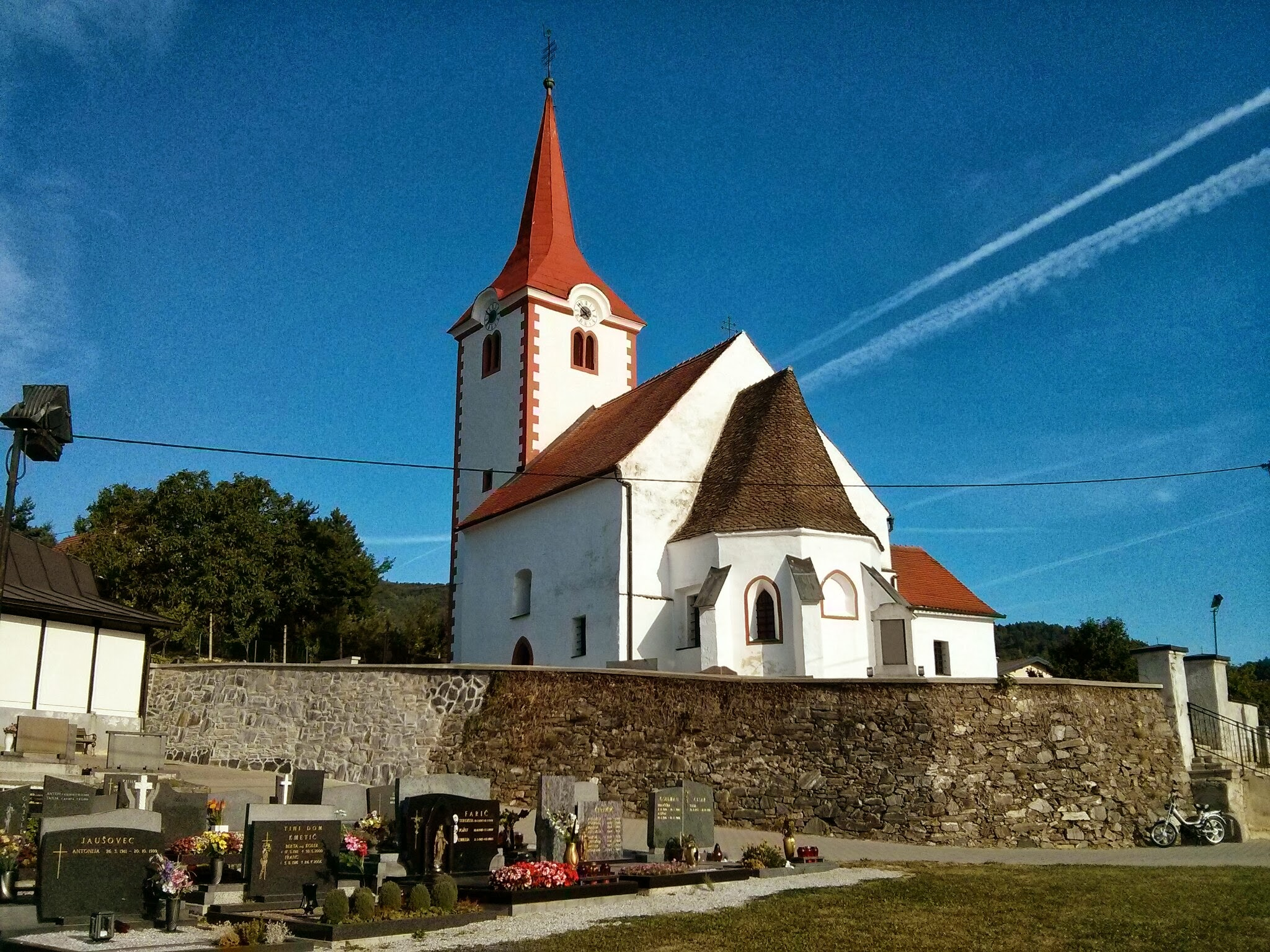 Cerkev Sv. Mihaela